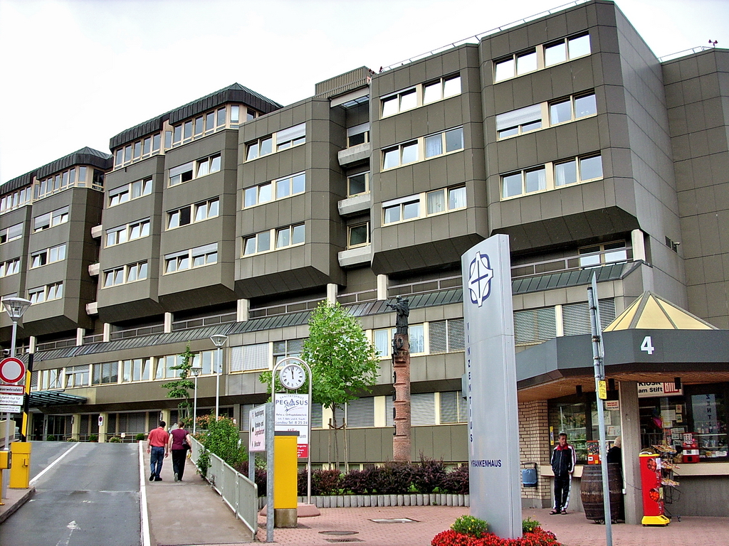 Landau-Vinzentus Krankenhaus